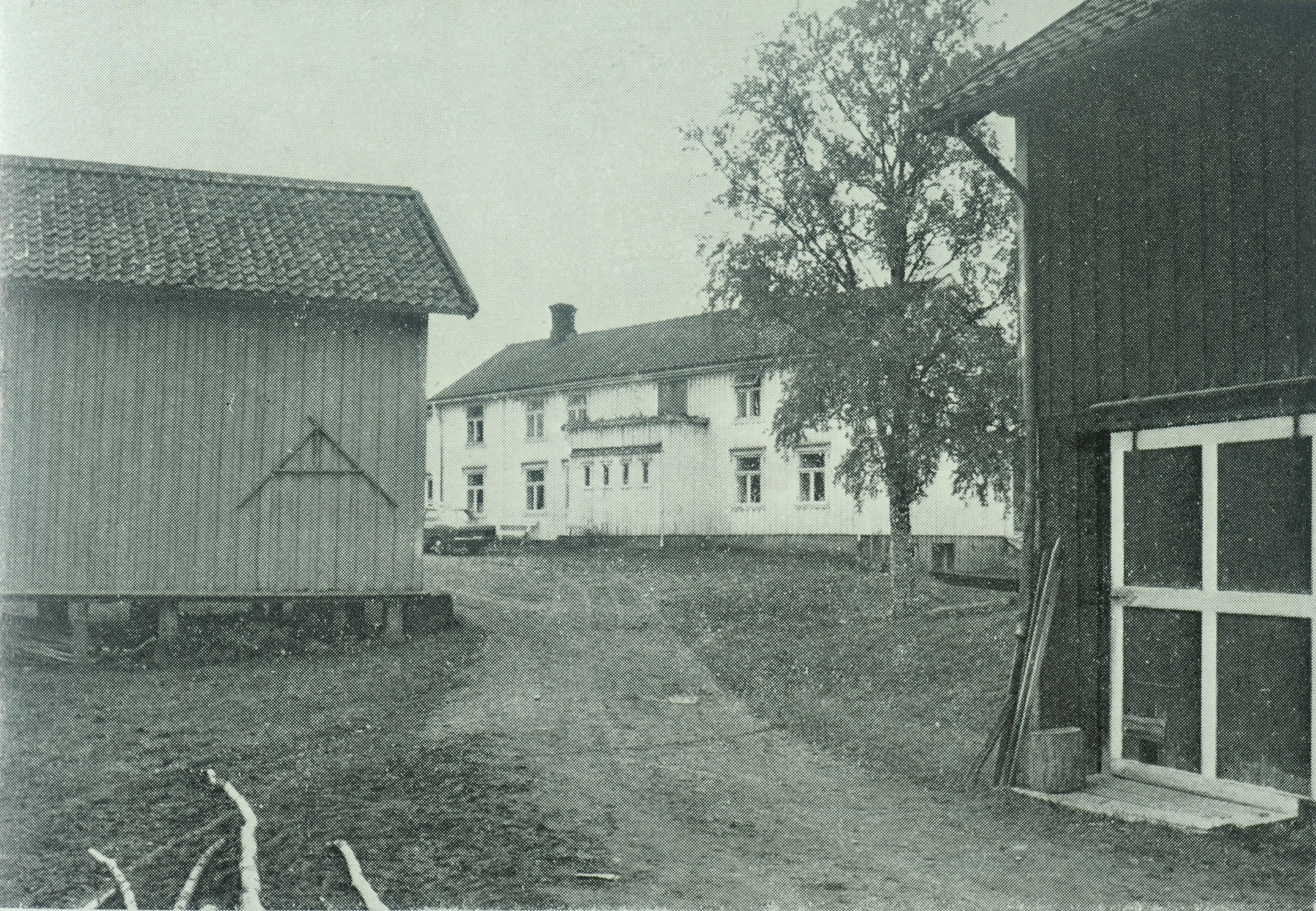 Kroppan gård. Eksteriør. Hovedhuset. En bil står foran huset.